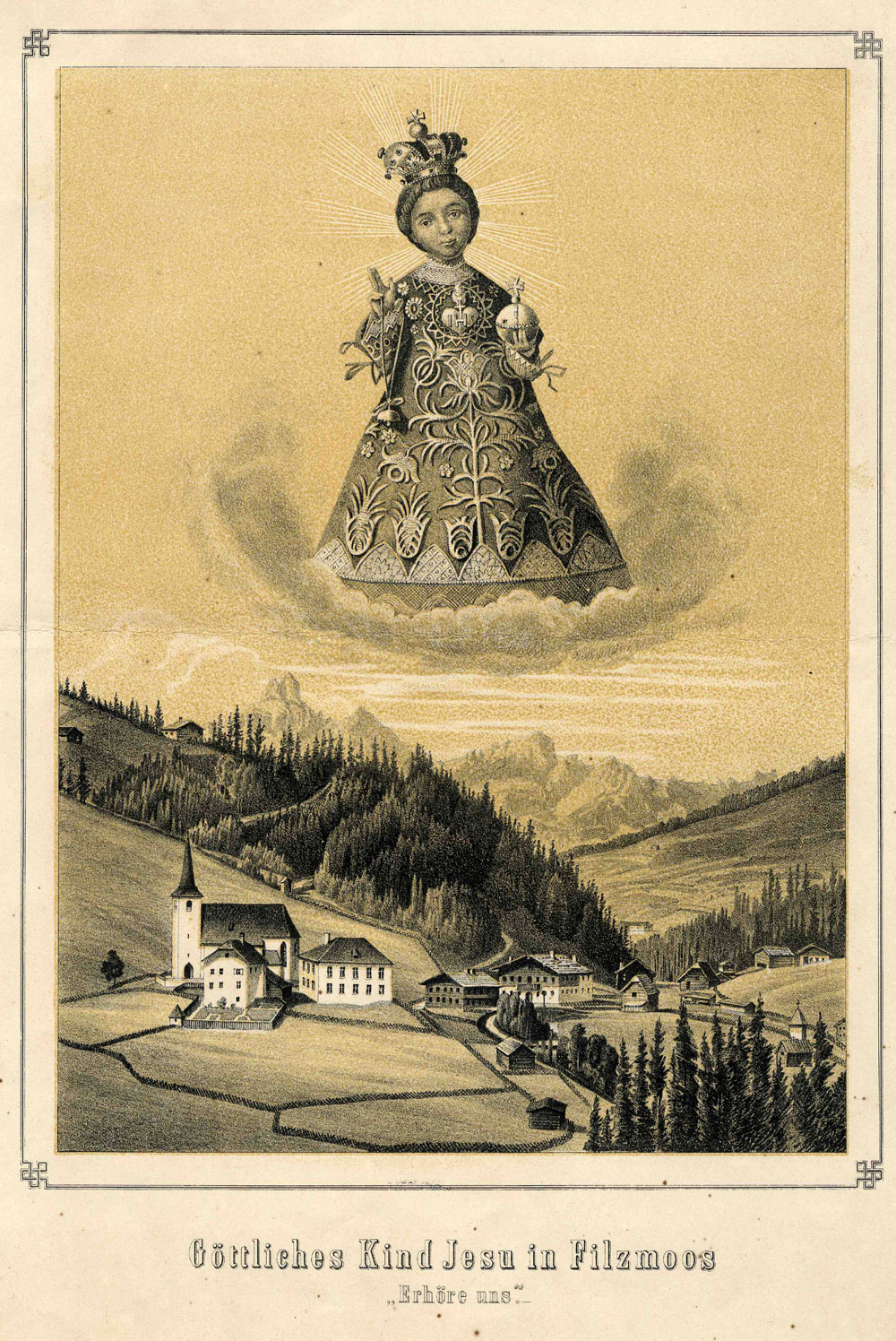 Filzmoos, "Göttliches Kind Jesu in Filzmoos" (Gedenkblatt), Lithographie, um 1850